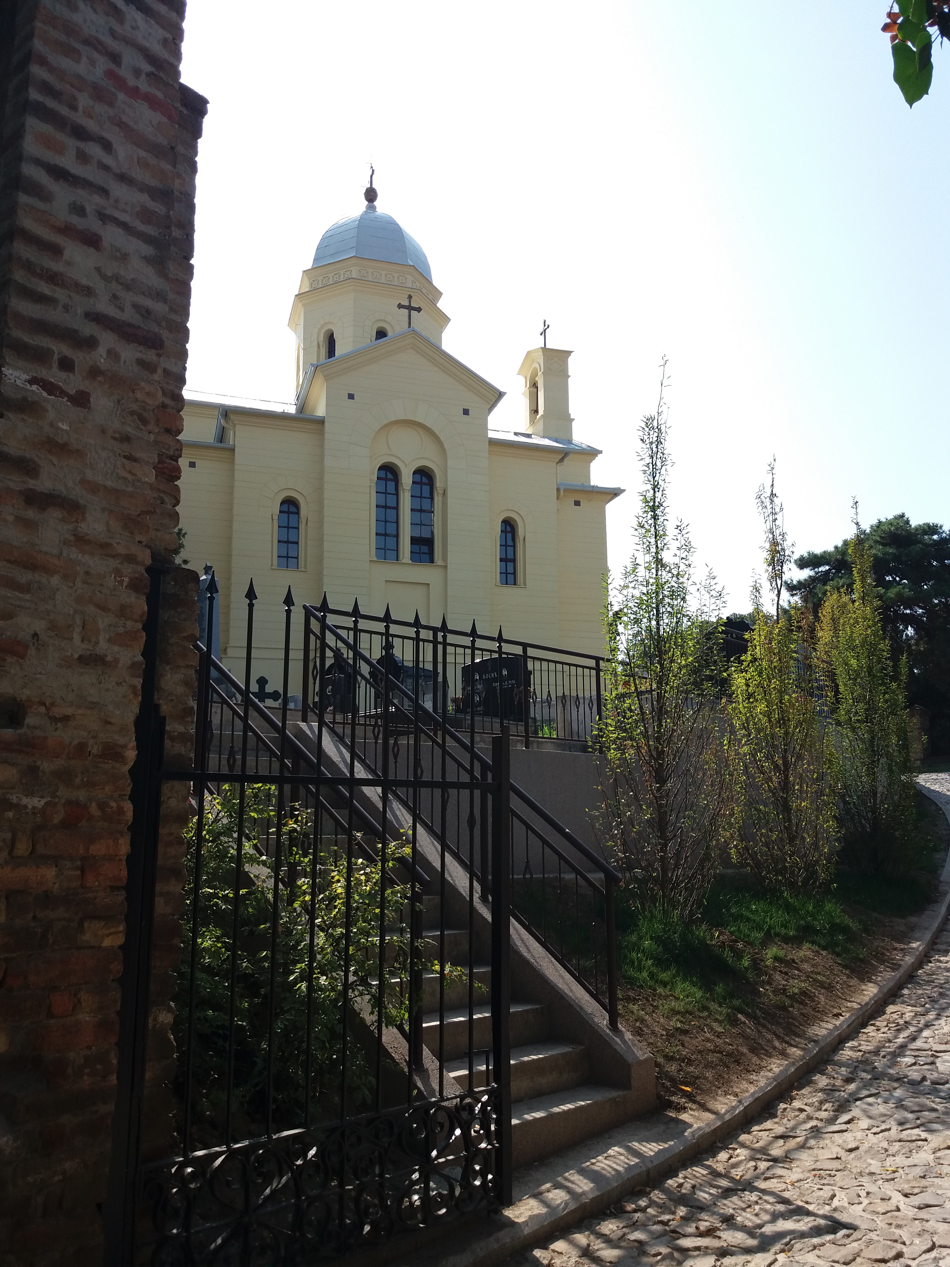 Srpski (latinica): Crkva Svetog Dimitrija, Zemun